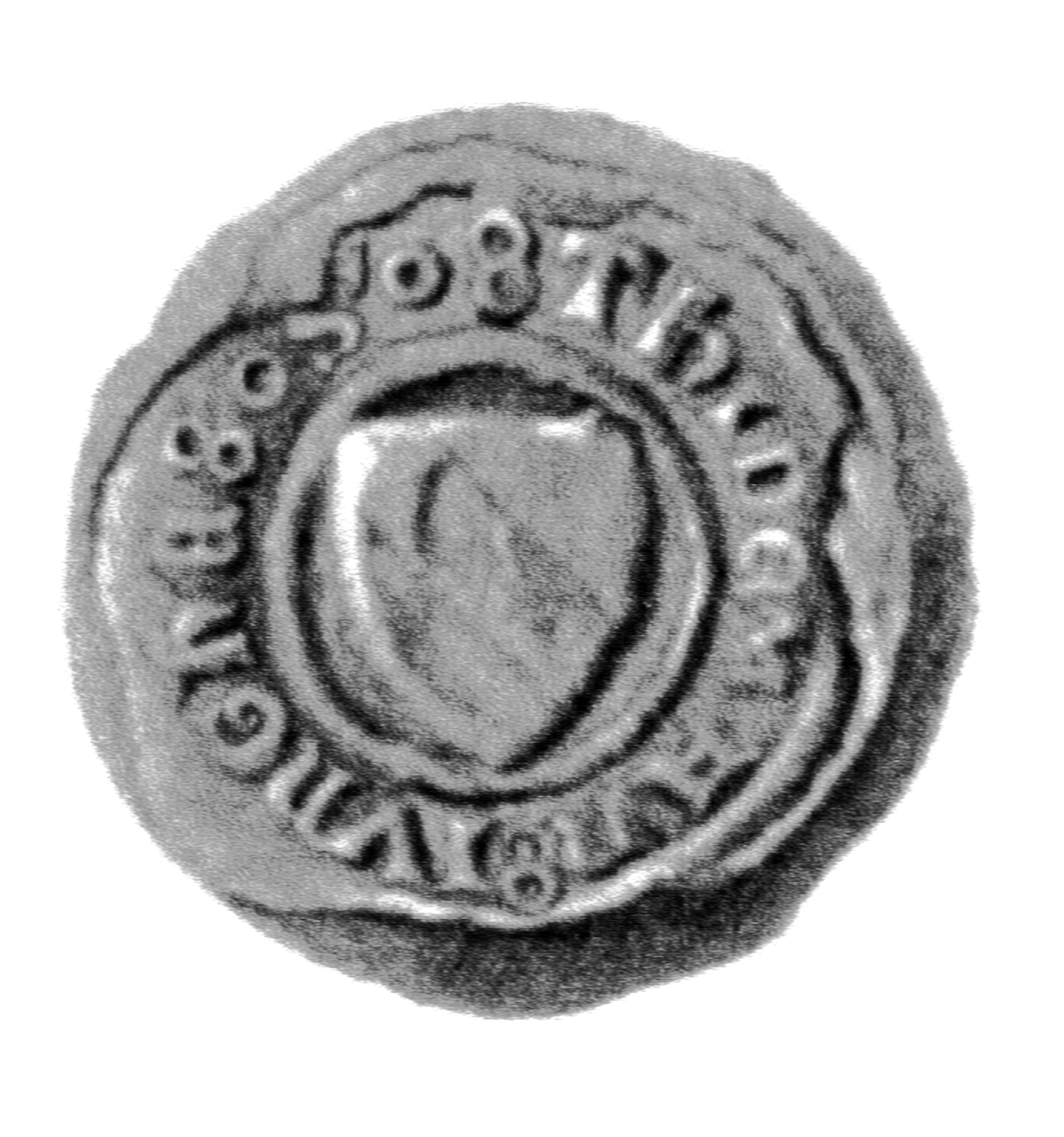 Siegel des Ratsmannes Tidemann Junge. Das Siegel stammt aus der Zeit um 1408. Siehe Emil Ferdinand Fehling: Lübeckische Ratslinie, Nr. 430 (Tidemann Junge).